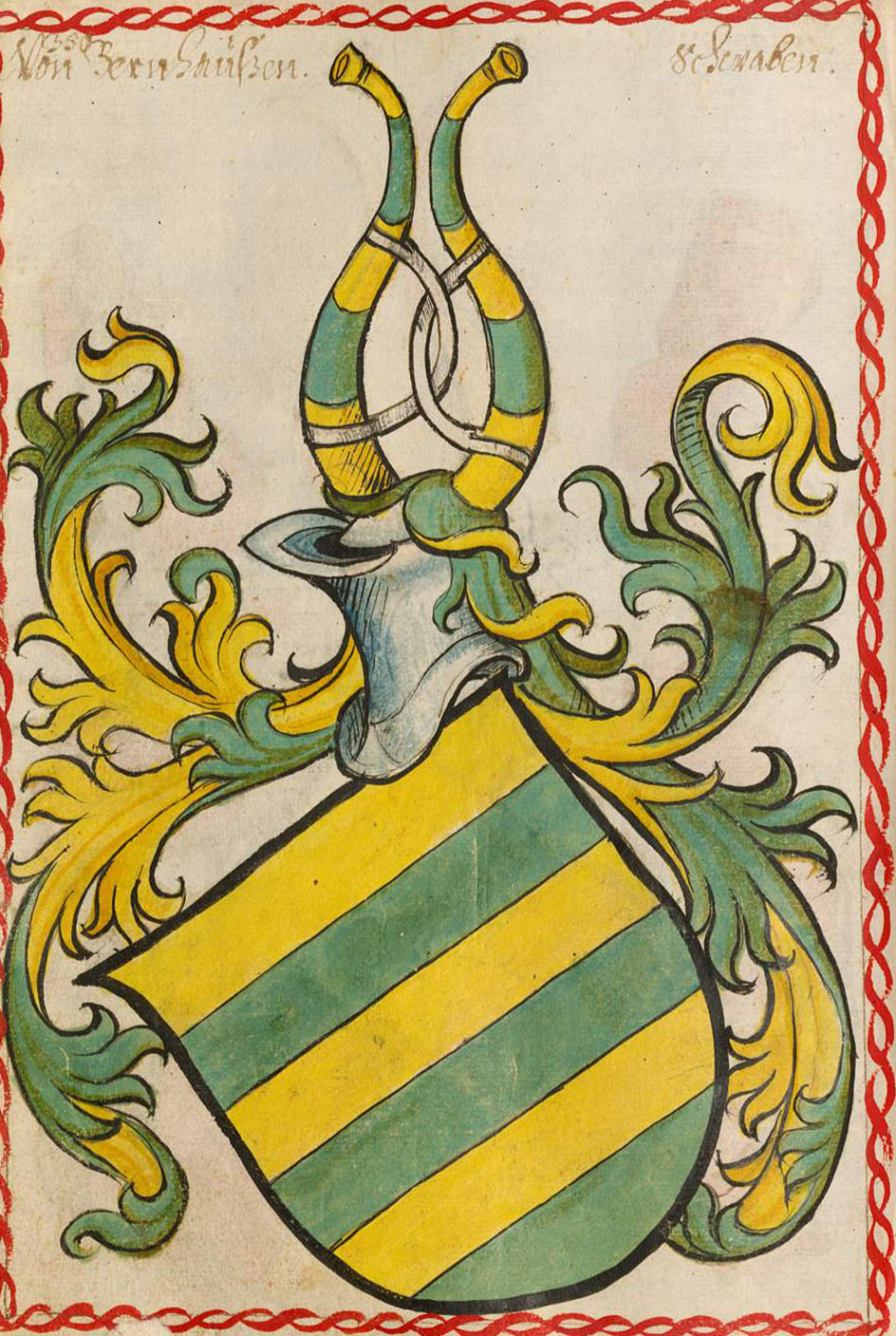 Scheibler'sches Wappenbuch, älterer Teil Bernhausen